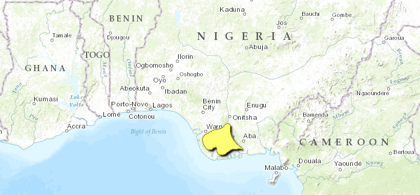 Mappa Ecoregione AT0122 - Foreste palustri del delta del Niger